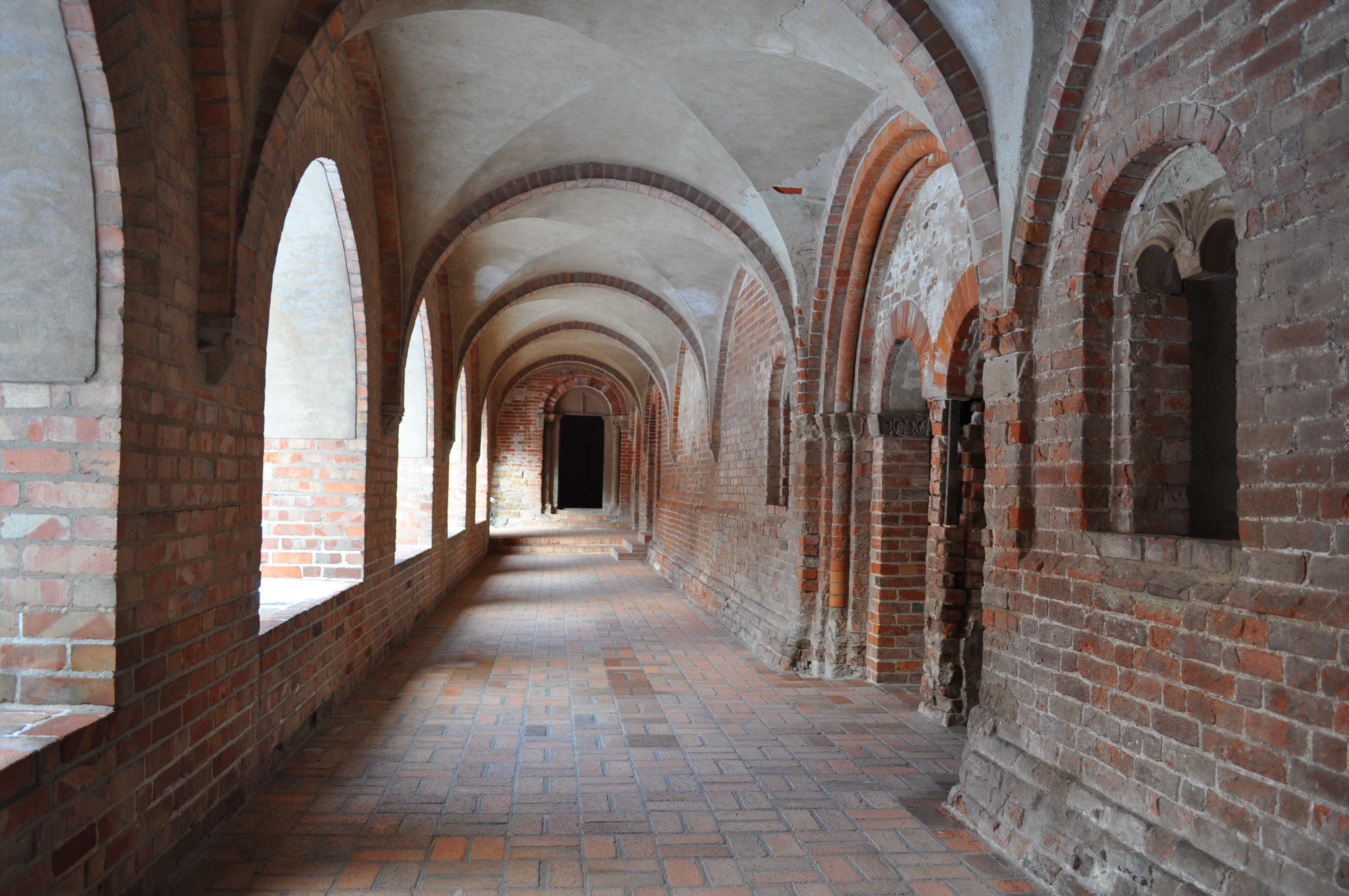 Kloster Jerichow